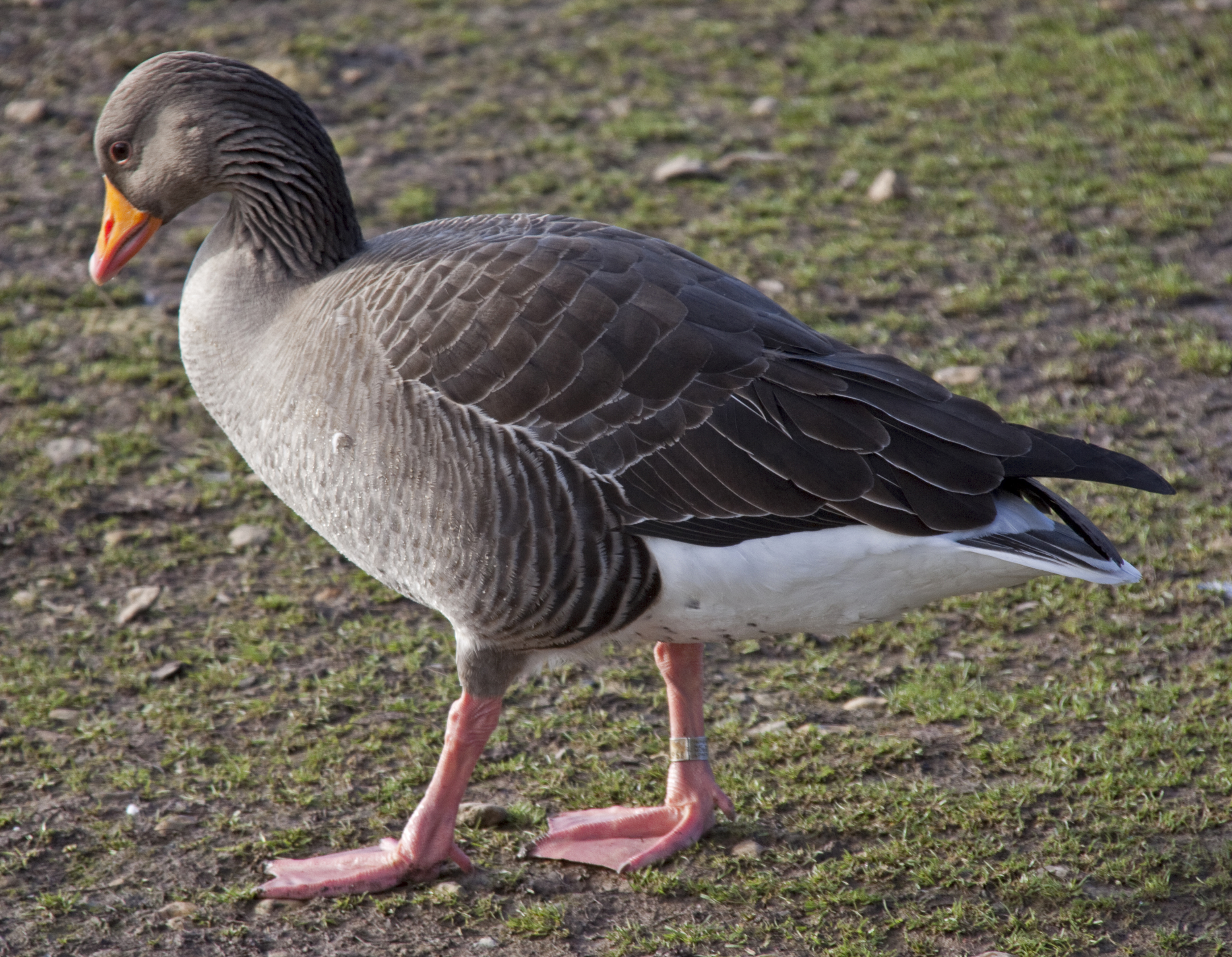 Greylag goose Anser anser